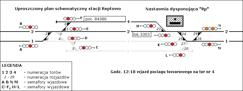 Stacja Reptowo 5 maja 1997 godz. 12:18 wjazd poc. tow. 84386 na tor nr 4